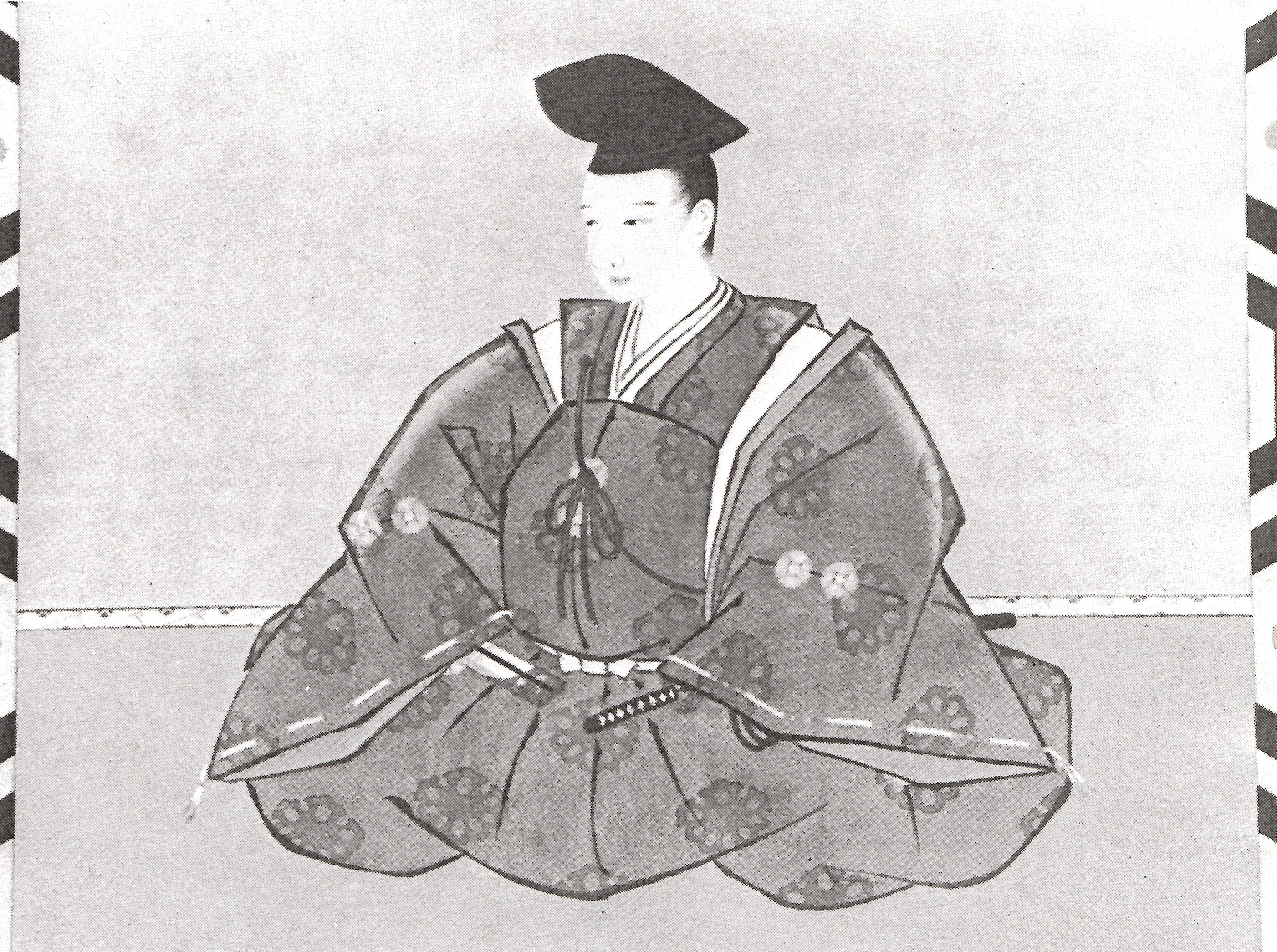 松平定則の肖像。